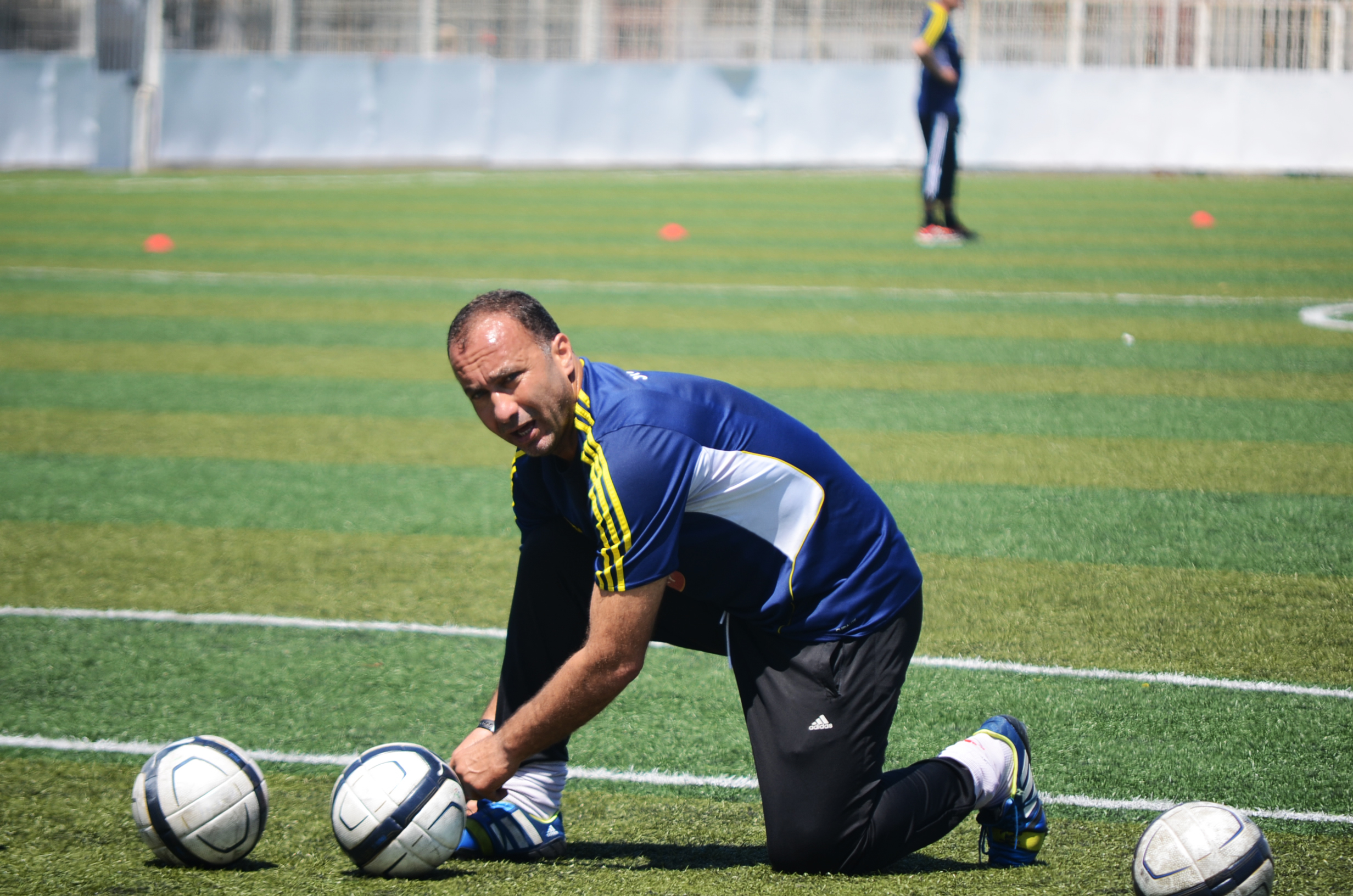 Farid Belmellat, entraîneur des gardiens de but de l'USM Alger, en pleine séance d'entraînement au stade Omar-Hamadi de Bologhine.